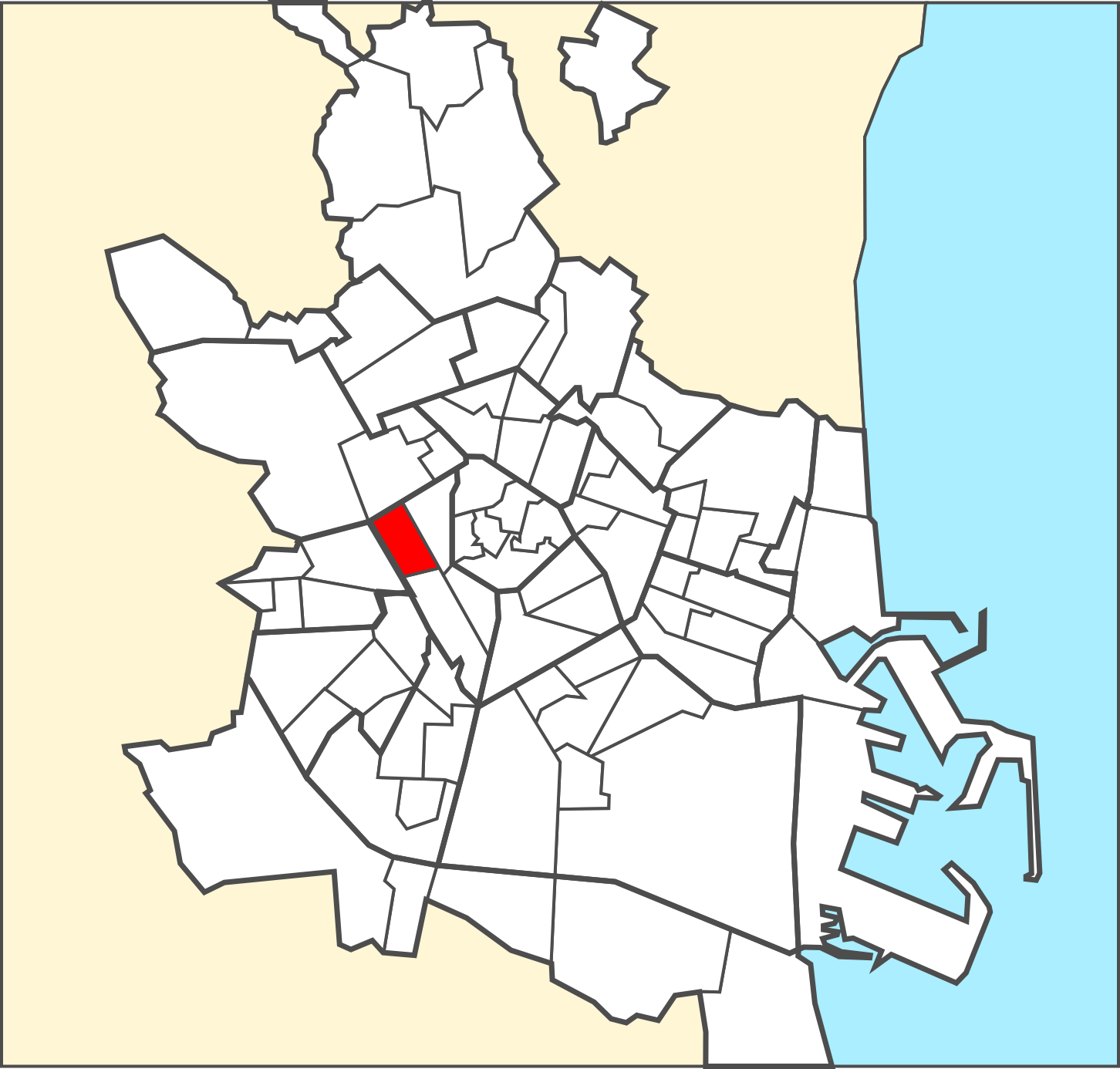 Localització del barri dins de la ciutat de València.